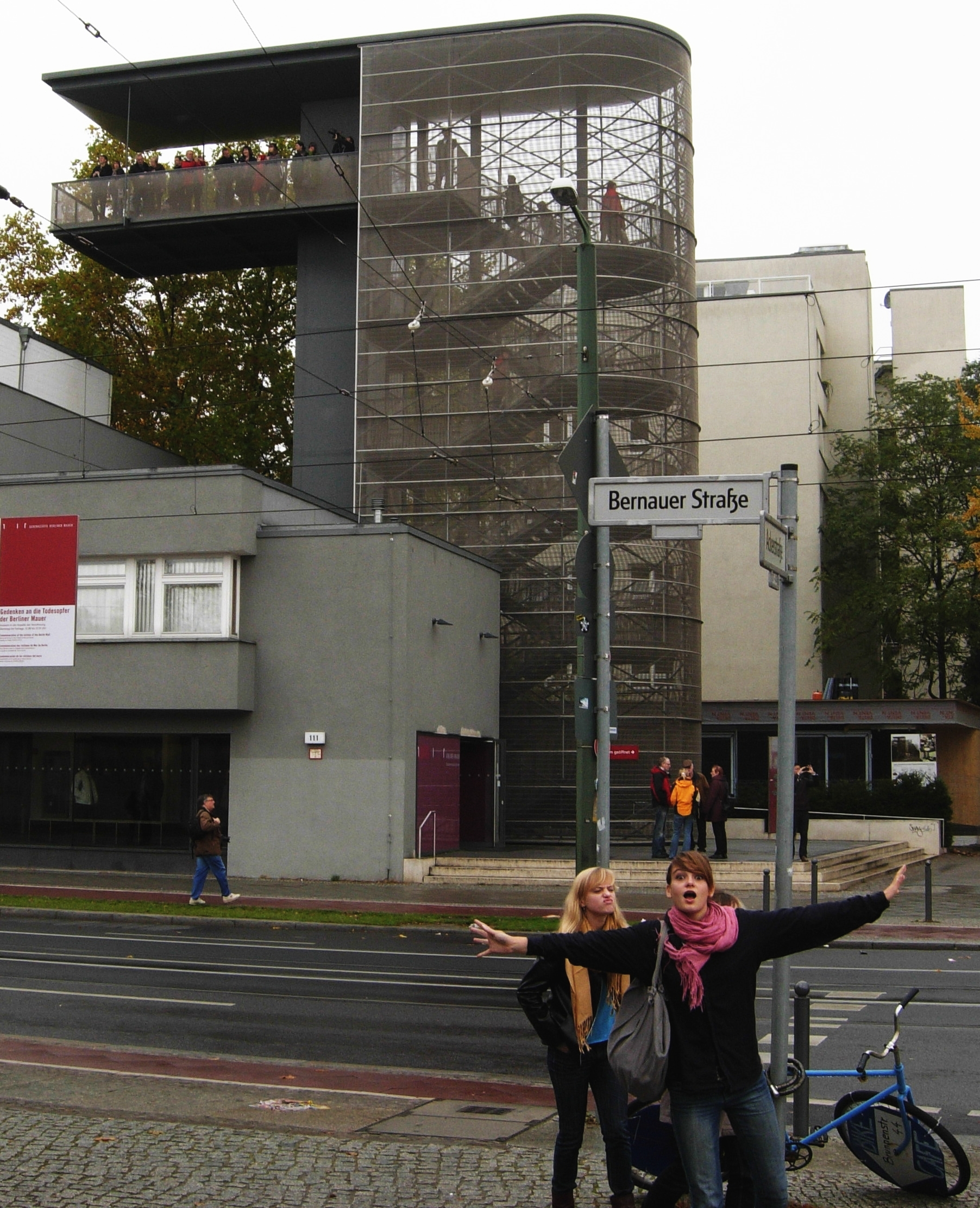 Aussichtsturm des Dokumentationszentrums Berliner Mauer an der Bernauer Straße in Berlin-Mitte (das Foto wurde aus der Ackerstraße heraus aufgenommen)